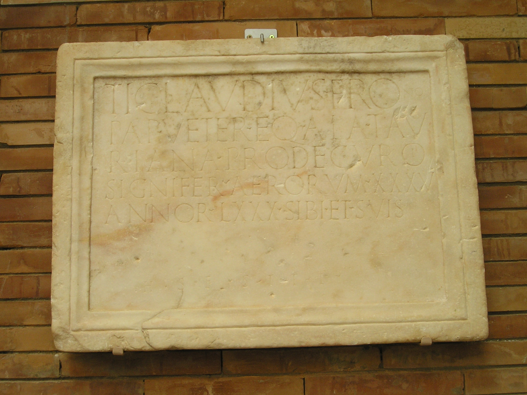 Inscripción funeraria romana procedente de Mérida (Badajoz, España), conservada en el Museo Nacional de Arte Romano de la localidad, correspondiente con ERAEmerita 124: Ti(berius) Claudius Fronto / Pap(iria) veter(anus) eq(ues) ala Tau/riana prodecurio / signifer aerorum XXXV / annor(um) LXXX sibi et suis / h(ic) s(itus) e(st) s(it) t(ibi) t(erra) l(evis)